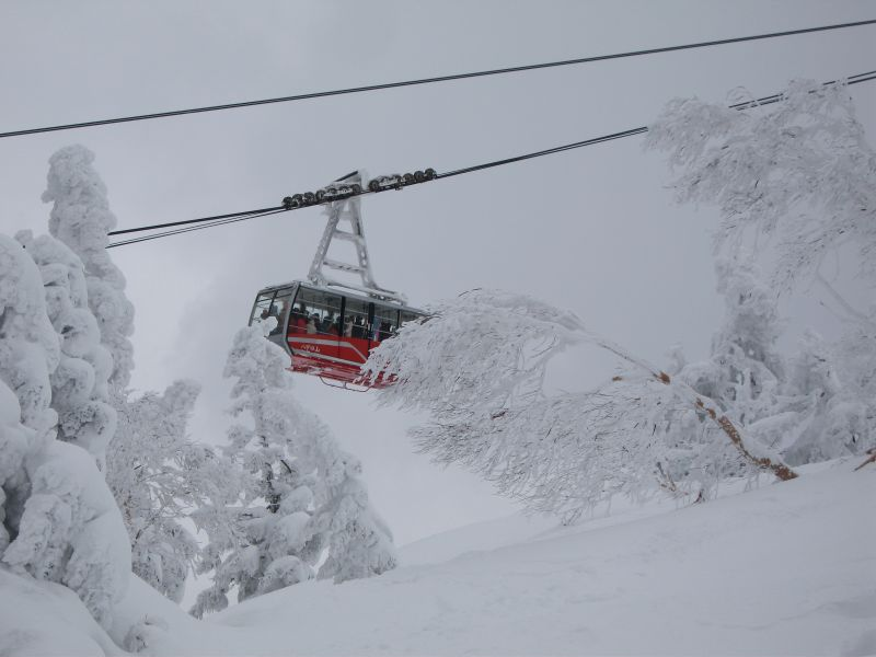 Hakkoda Ropeway, Aomori.